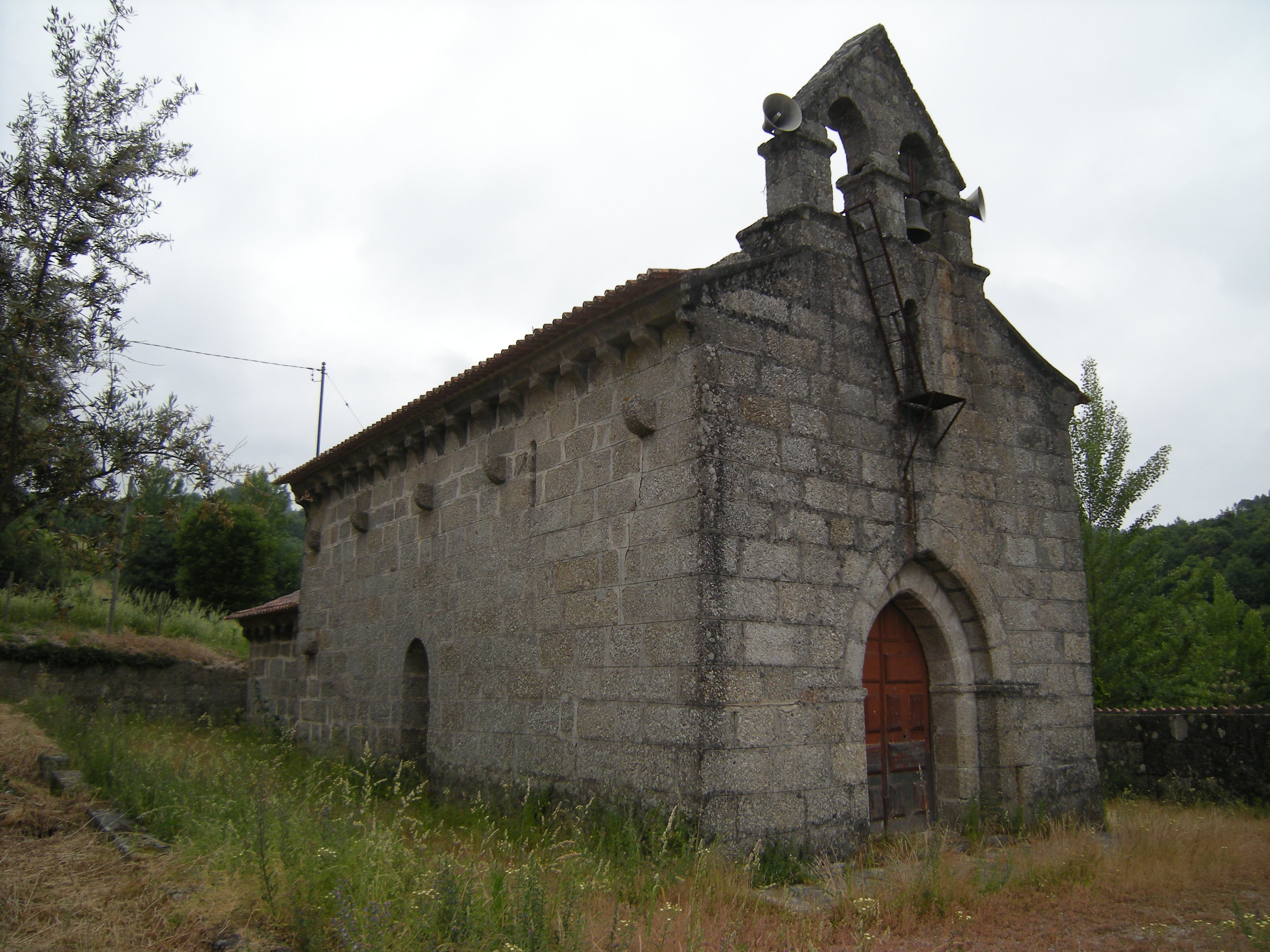 Igreja de São Salvador em Lufrei, Amarante, Região do Porto, Portugal.